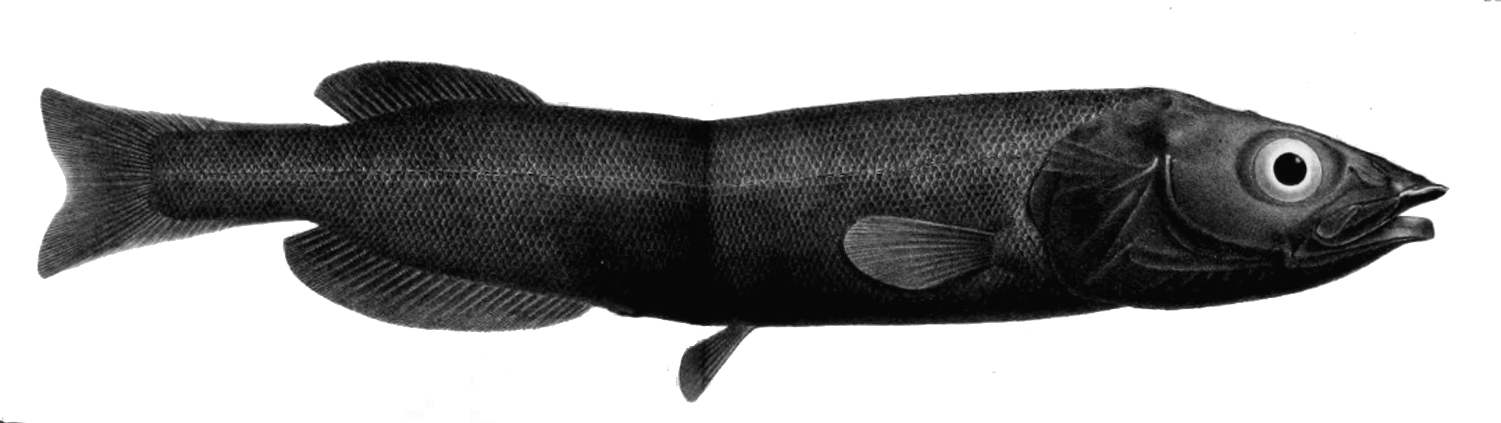 Conocara nigrum